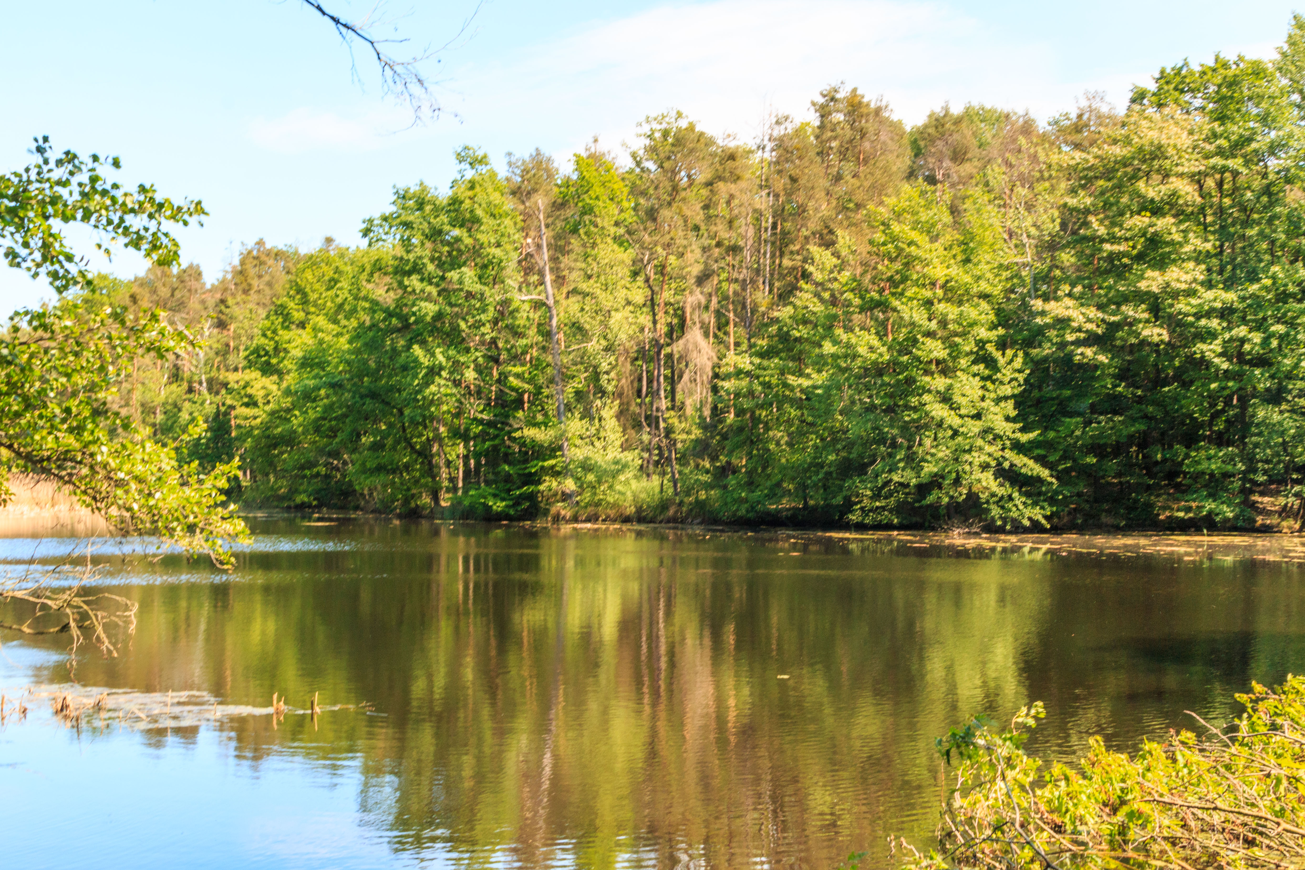 Rybník Špičník u Vysokého Chvojna Project: Vodstvo.